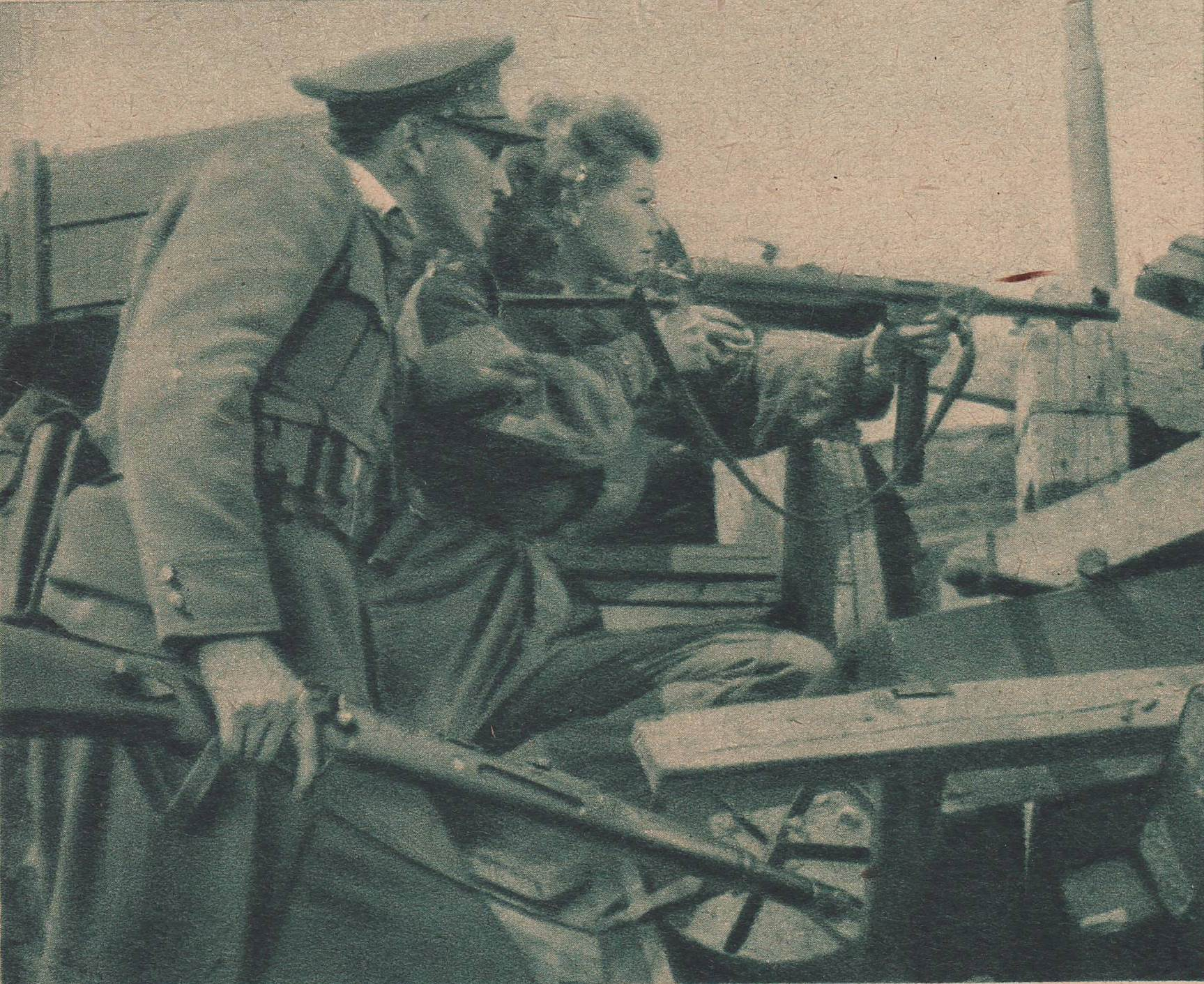 Barbara Drapińska w filmie "Němá barikáda"